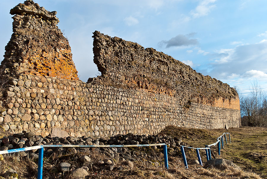 Беларуская (тарашкевіца): Фрагмэнты замку. в. Крэва This is a photo of Belarusian heritage monument. Reference number: 412Г000602 ( WLM)